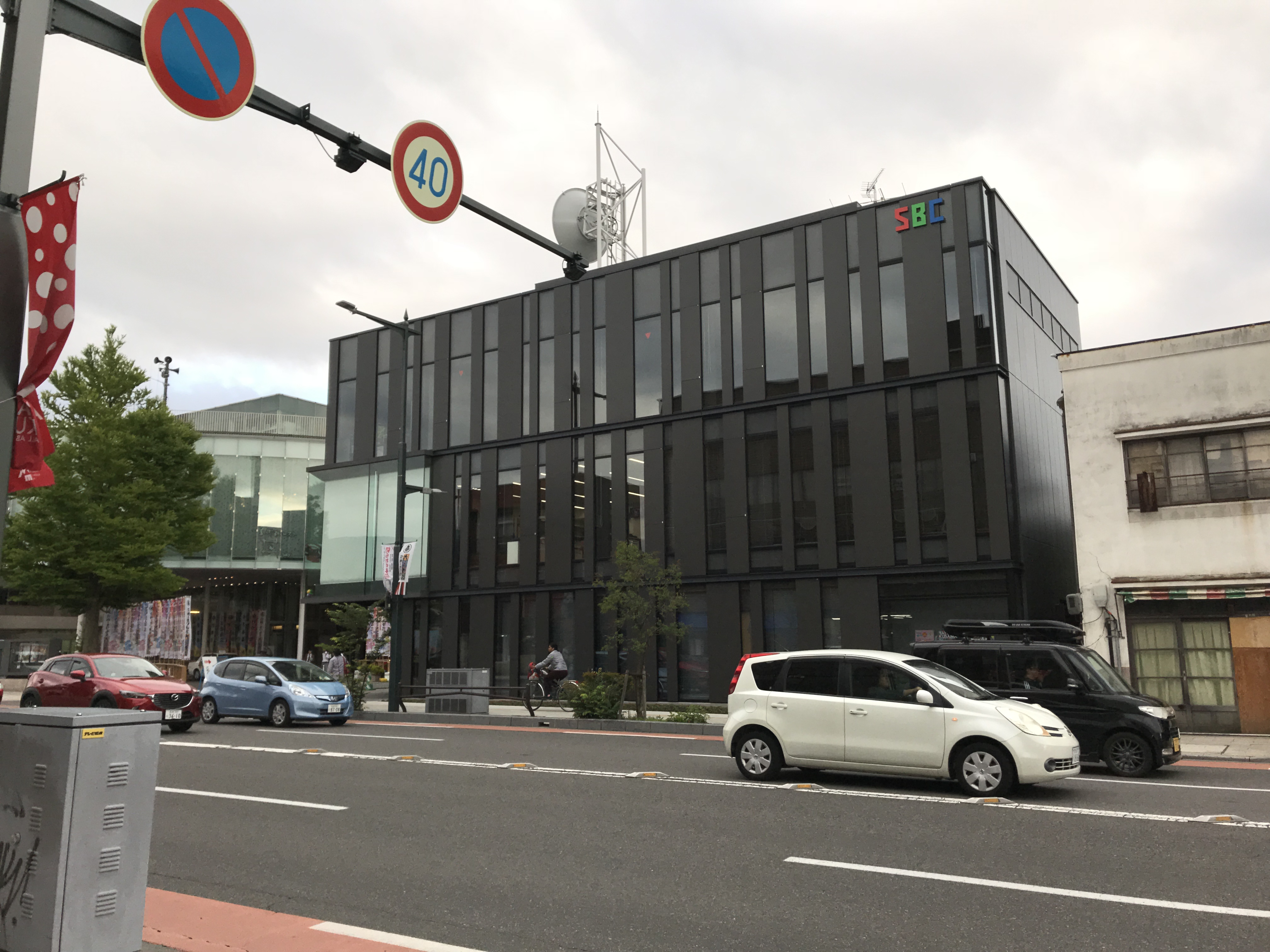 信越放送松本支局。